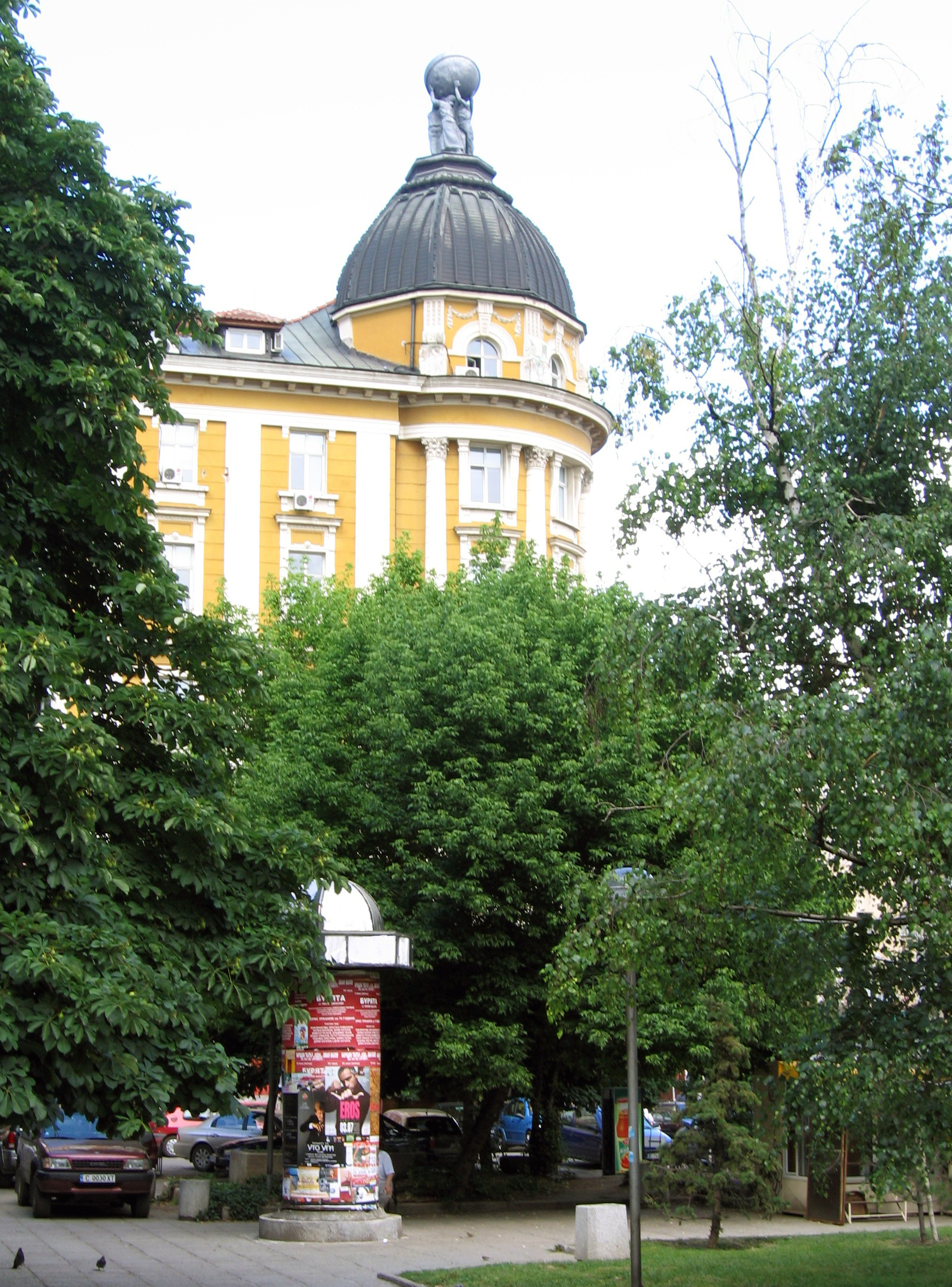 Сграда на “"Раковска" в София.